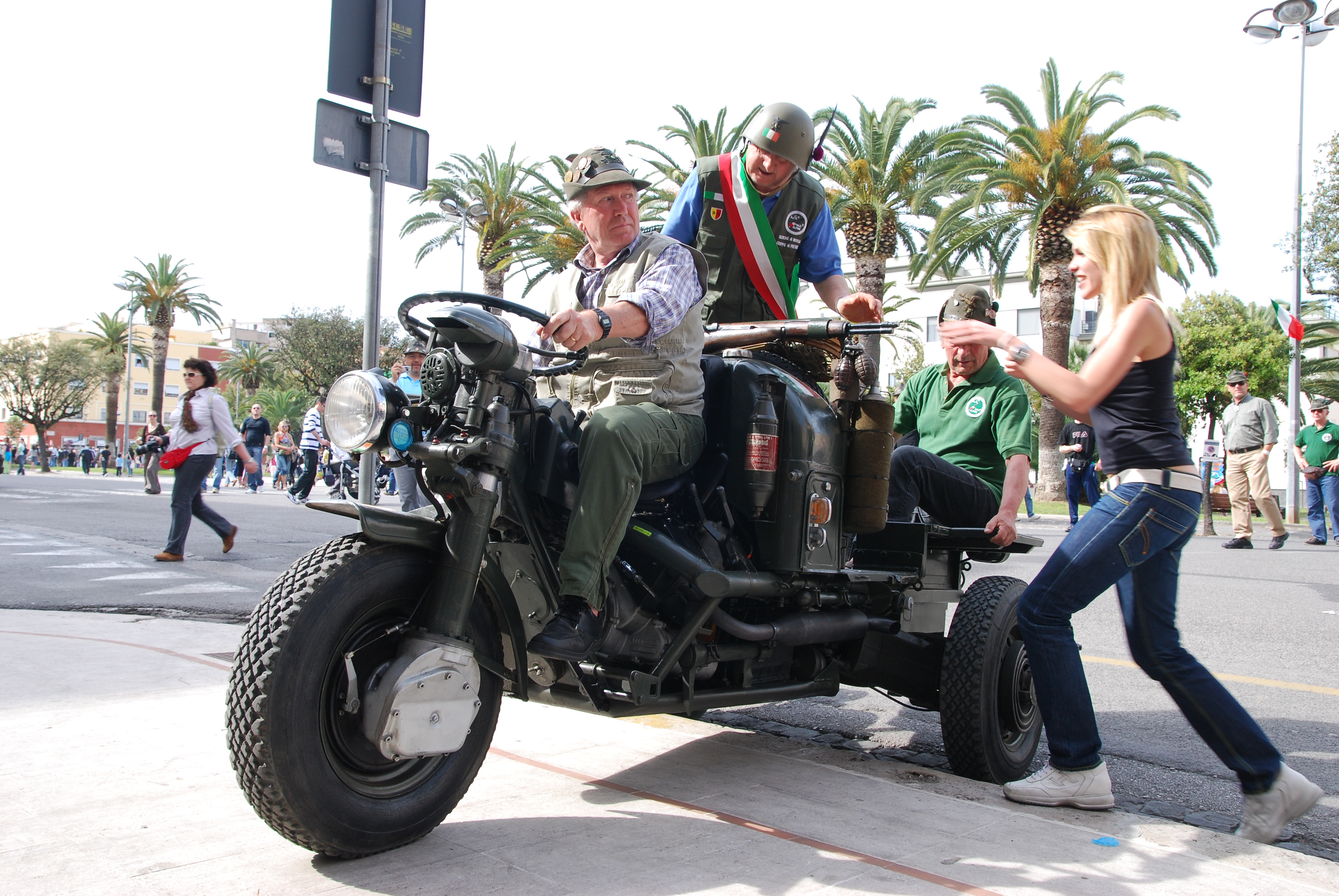 82° Adunata Nazionale Alpini a Latina 9-10 maggio 2009